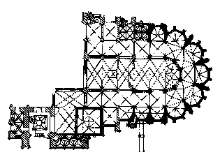 План собора после достройки Парлежем